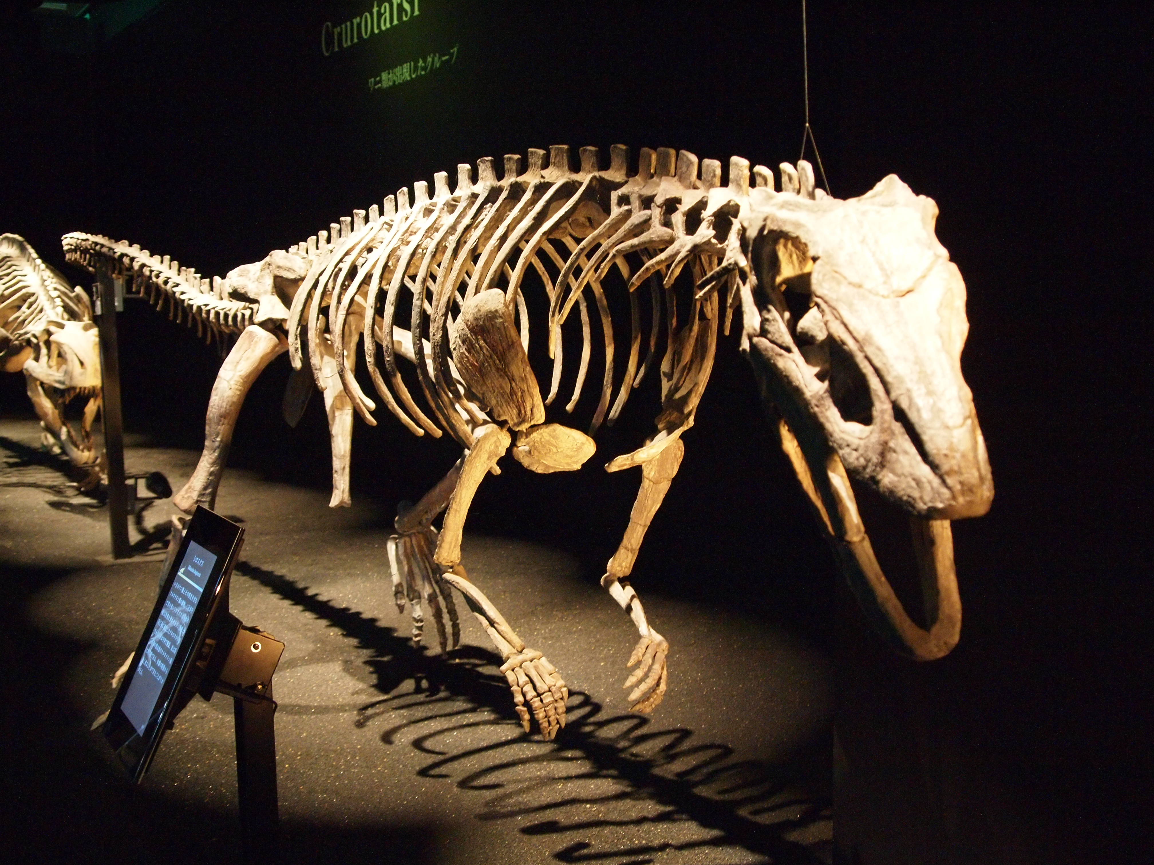 森アーツセンターギャラリー